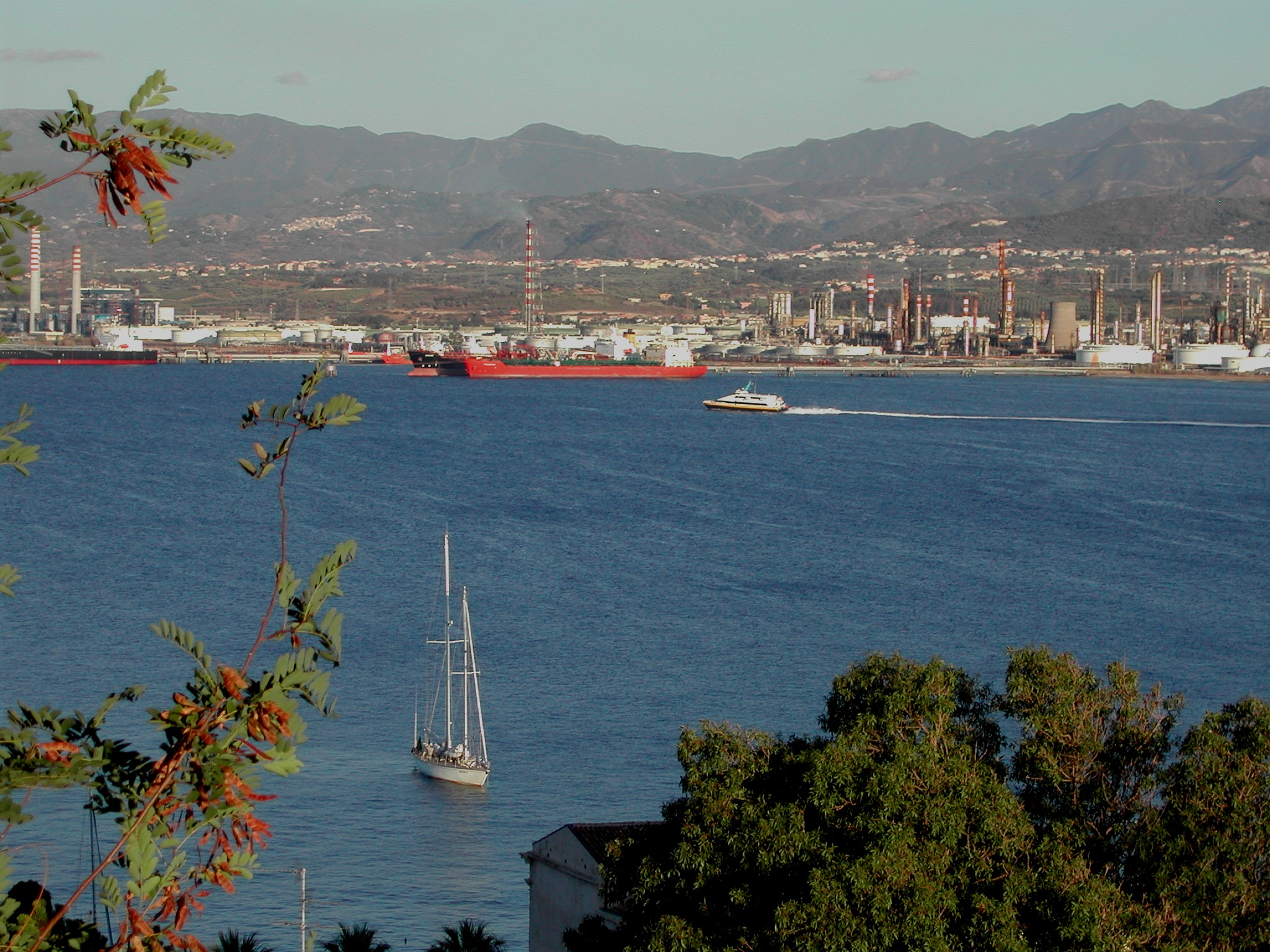 Raffineria di Milazzo vista dal piazzale dell'Immacolata